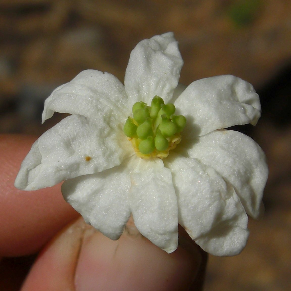 Drimys andina (Reiche) R.A. Rodr. & Quez. 20081208.25 Parque Nacional Huerquehue, Chile